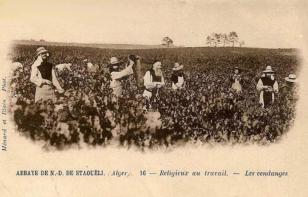 Au début du XXe siècle, vendanges faites par les moines de l'abbaye trappiste de Notre-Dame de Staouèli dans l'Algérois